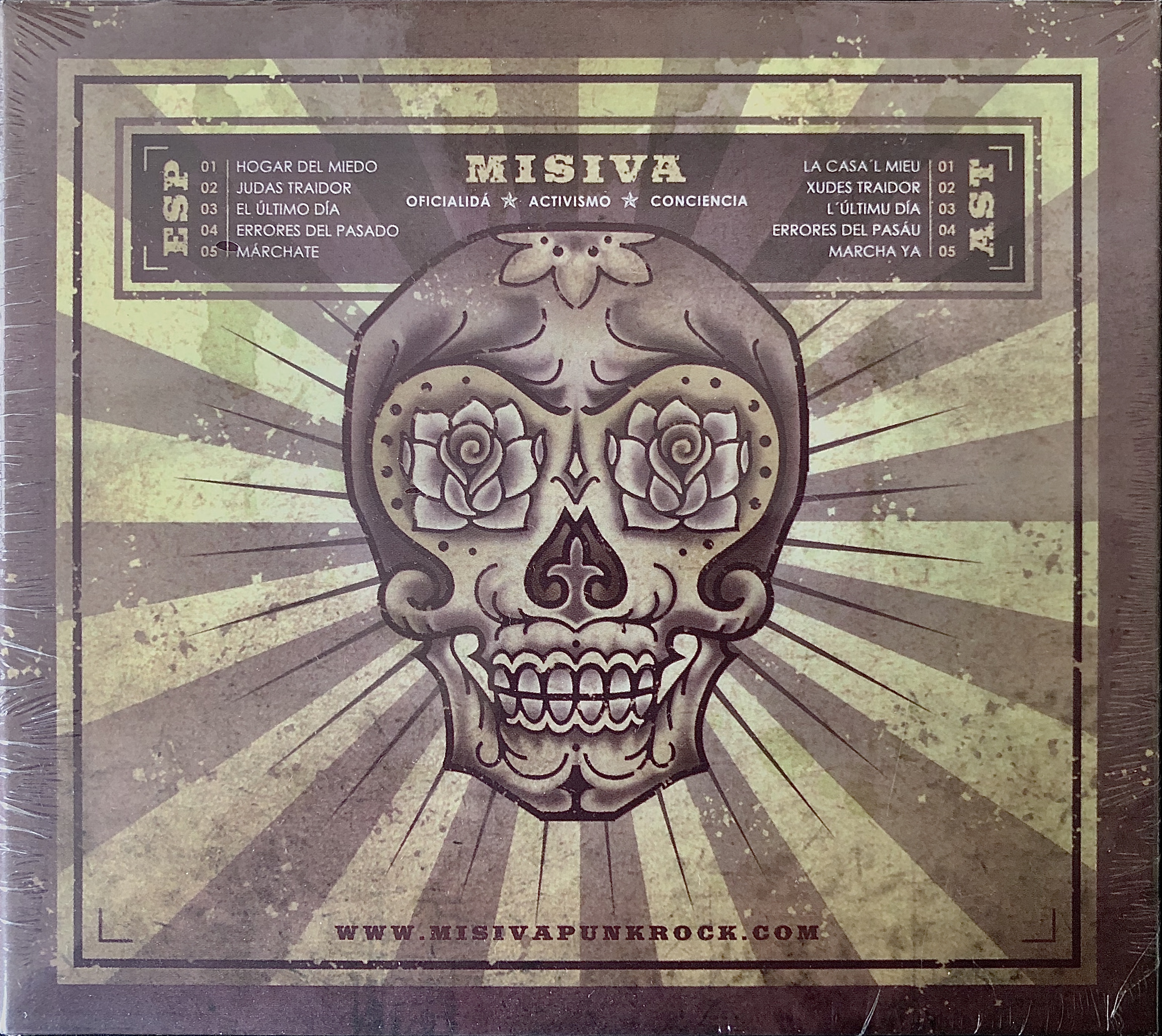 Misiva